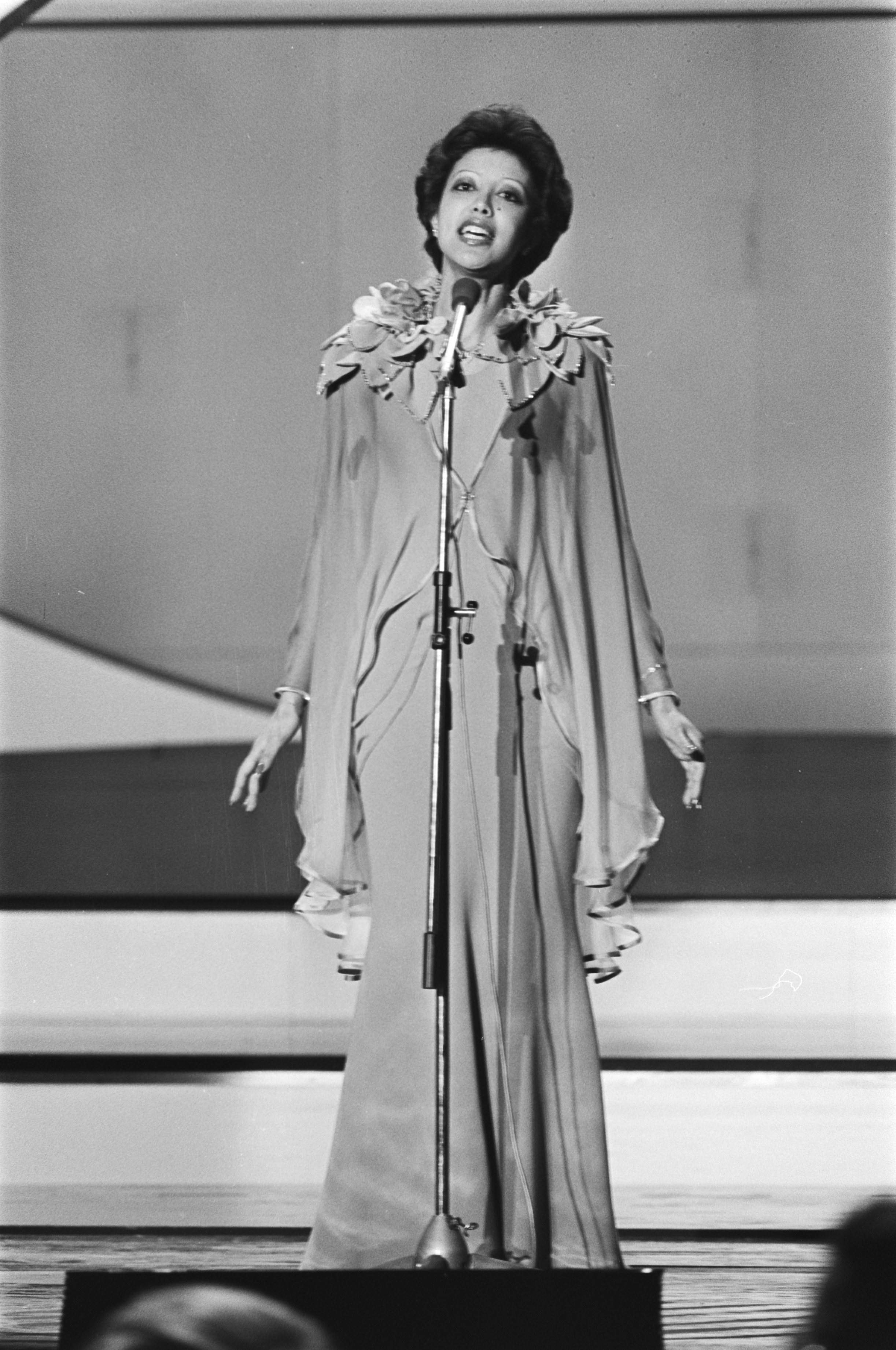 Collectie / Archief : Fotocollectie Anefo Reportage / Serie : [ onbekend ] Beschrijving : Eurovisie Songfestival 76 Den Haag ; Nederlandse deelneemster Sandra tijdens optreden Datum : 3 april 1976 Locatie : Den Haag, Zuid-Holland Trefwoorden : songfestivals Persoonsnaam : Eurovisie Songfestival Fotograaf : Mieremet, Rob / Anefo Auteursrechthebbende : Nationaal Archief Materiaalsoort : Negatief (zwart/wit) Nummer archiefinventaris : bekijk toegang 2.24.01.05 Bestanddeelnummer : 928-5007